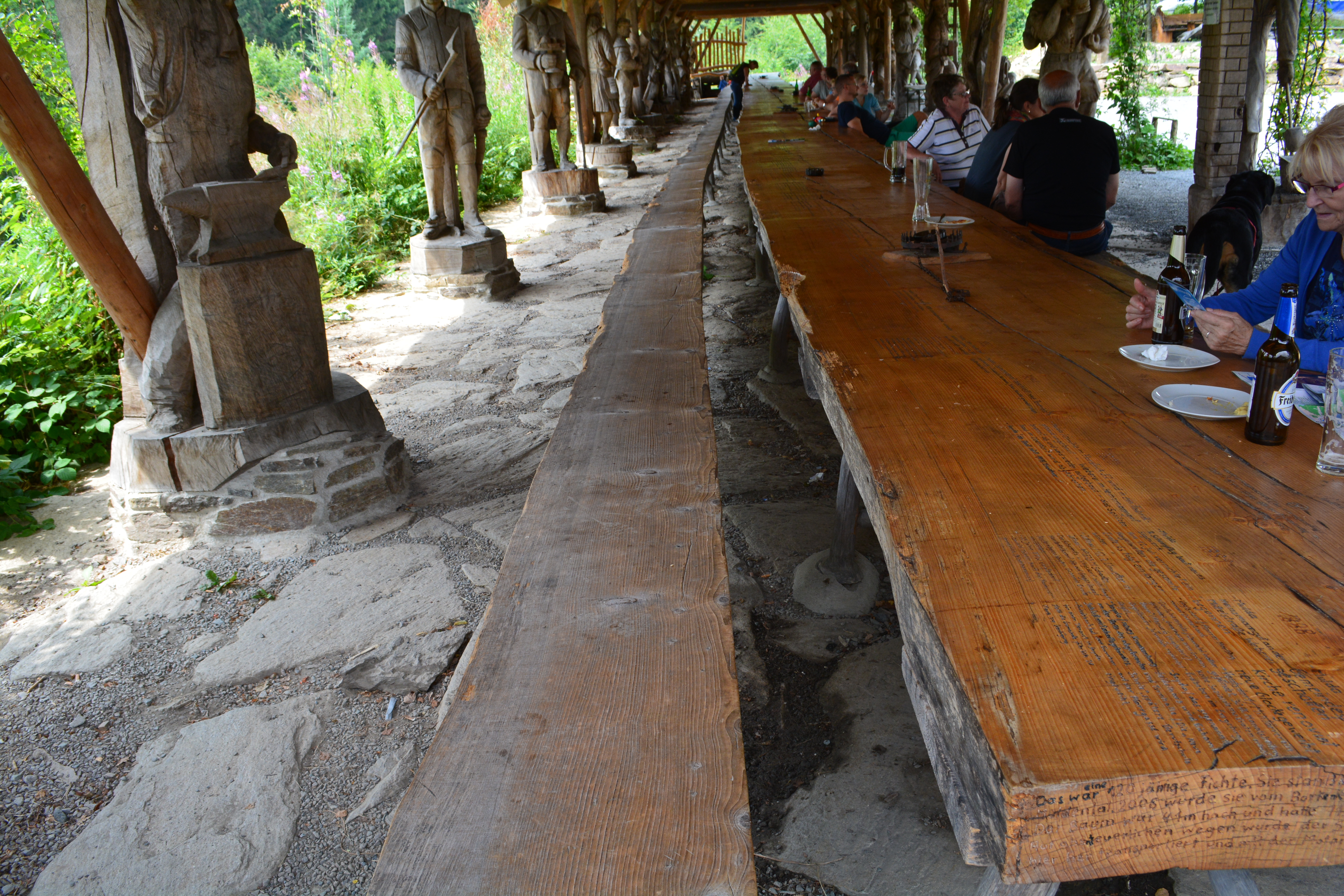 Blockhausen: Kettensägen-Schnitzen, diverse Bergmann-Figuren tragen das Dach über den längten Tisch der Welt mit 42 Meter Länge